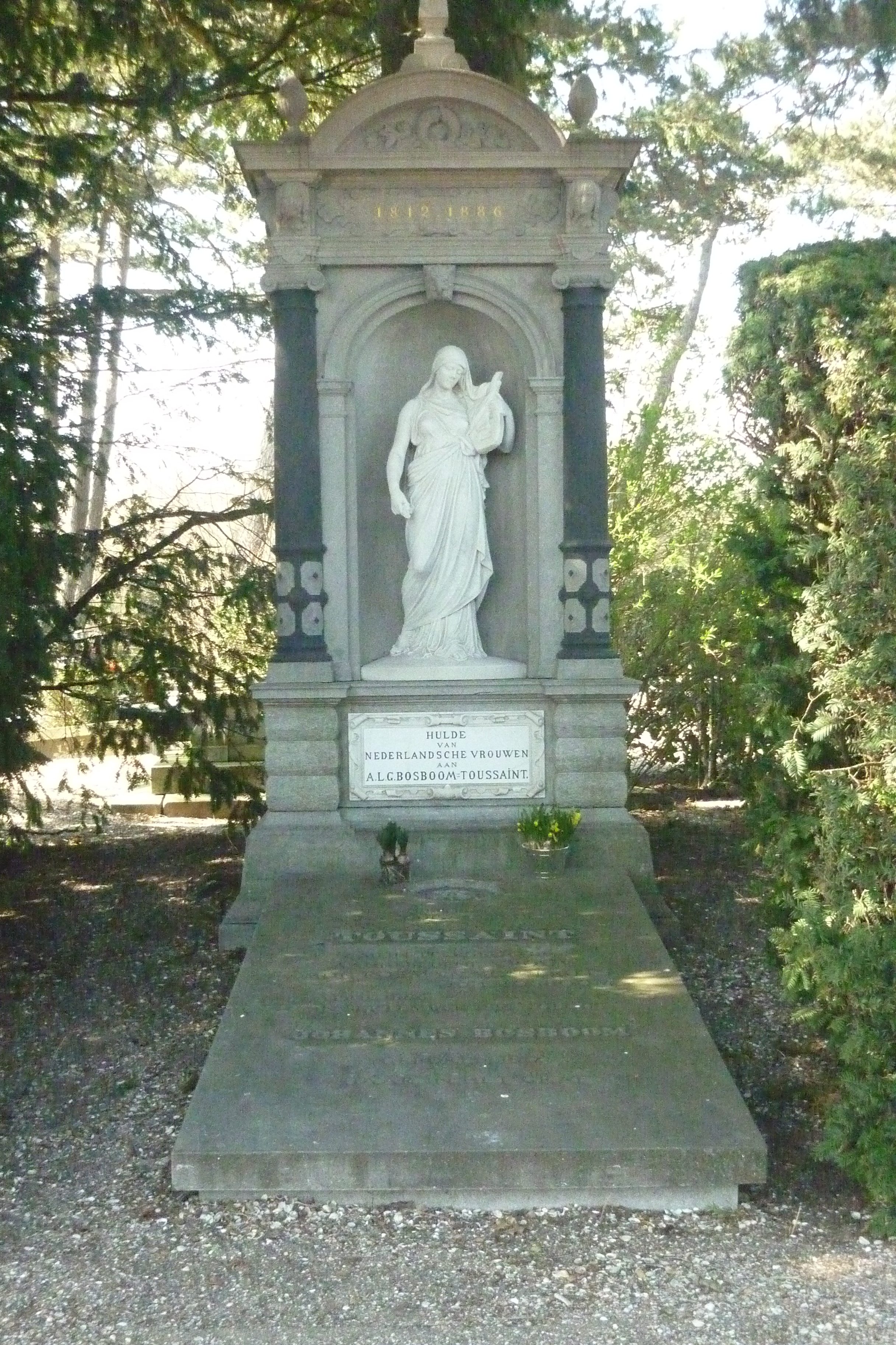 graf van Bosboom-Toussaint